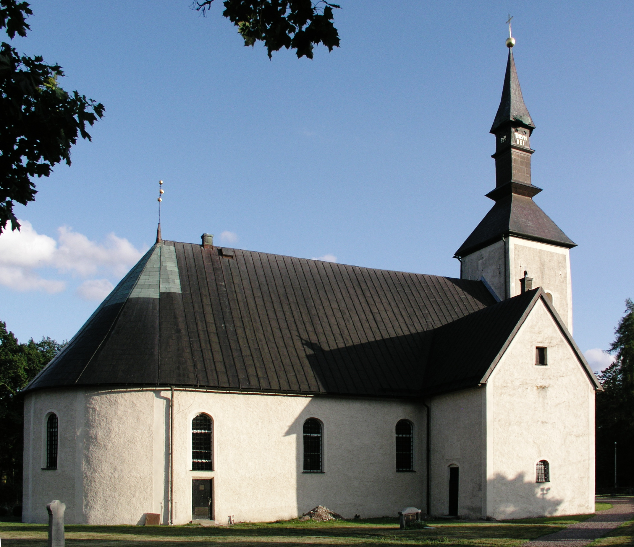 Brahekyrkan, Visingsö, Sweden.